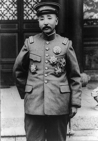 El cacique militar chino Zhang Zuolin, hacia 1928.